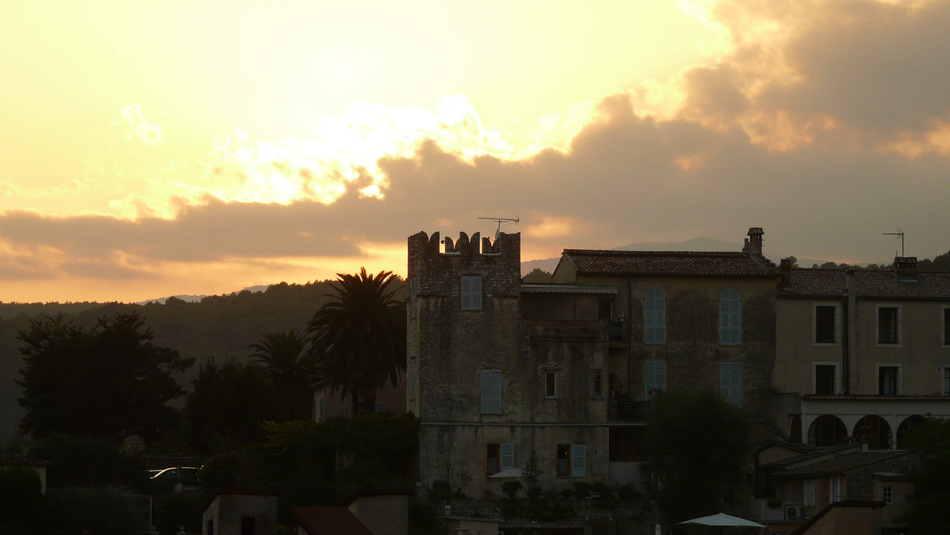 Abbaye du Canadel. La Colle-sur-Loup .